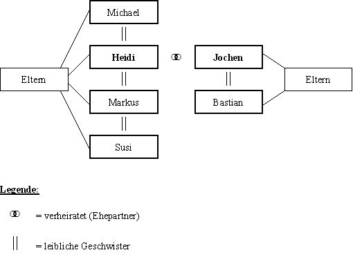 Skizze zur Erläuterung der Schwägerschaft im Falle der Ehe. Das Original ist 510×372px groß.